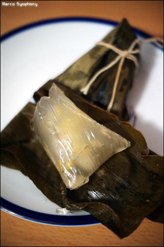 maxim's_ice_zongzi_2_2